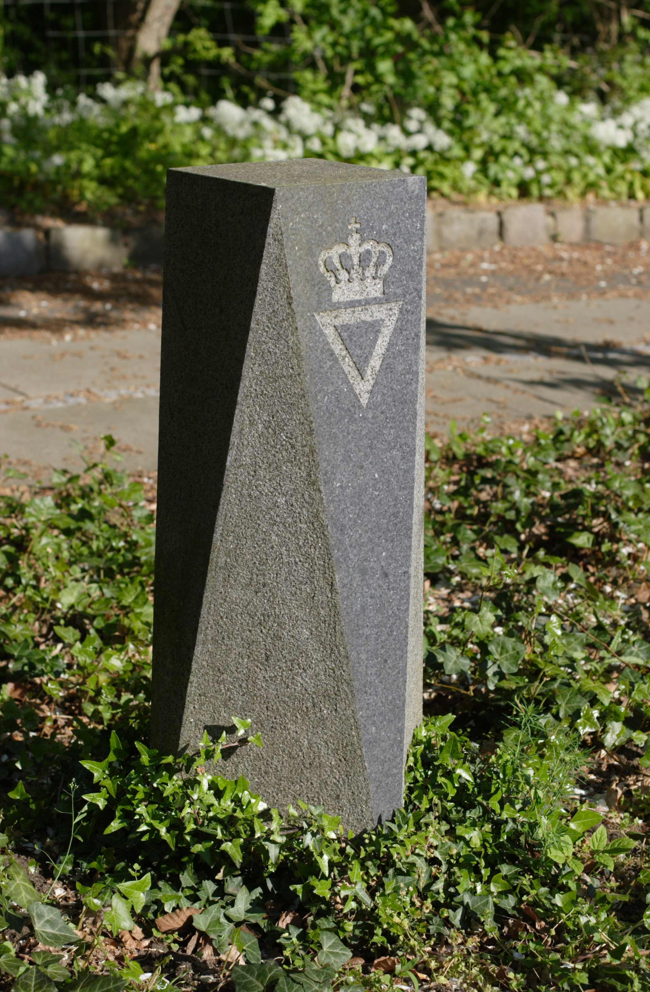 Vejprisen på Dronning Margrethesvej i Århus